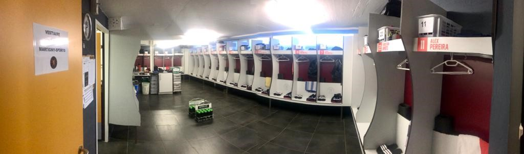 vestiaire principal